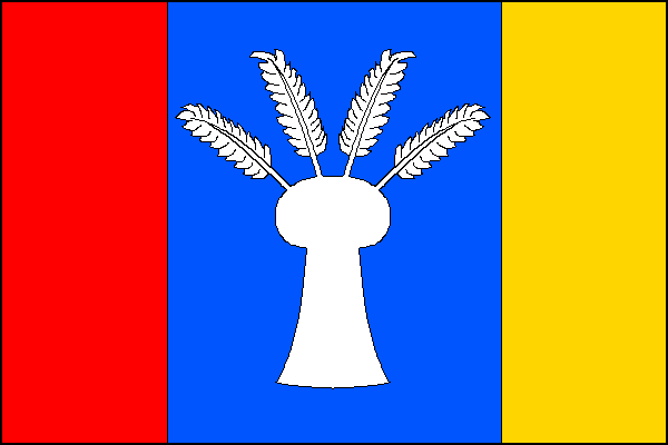 vlajka, Ústí, okres Přerov